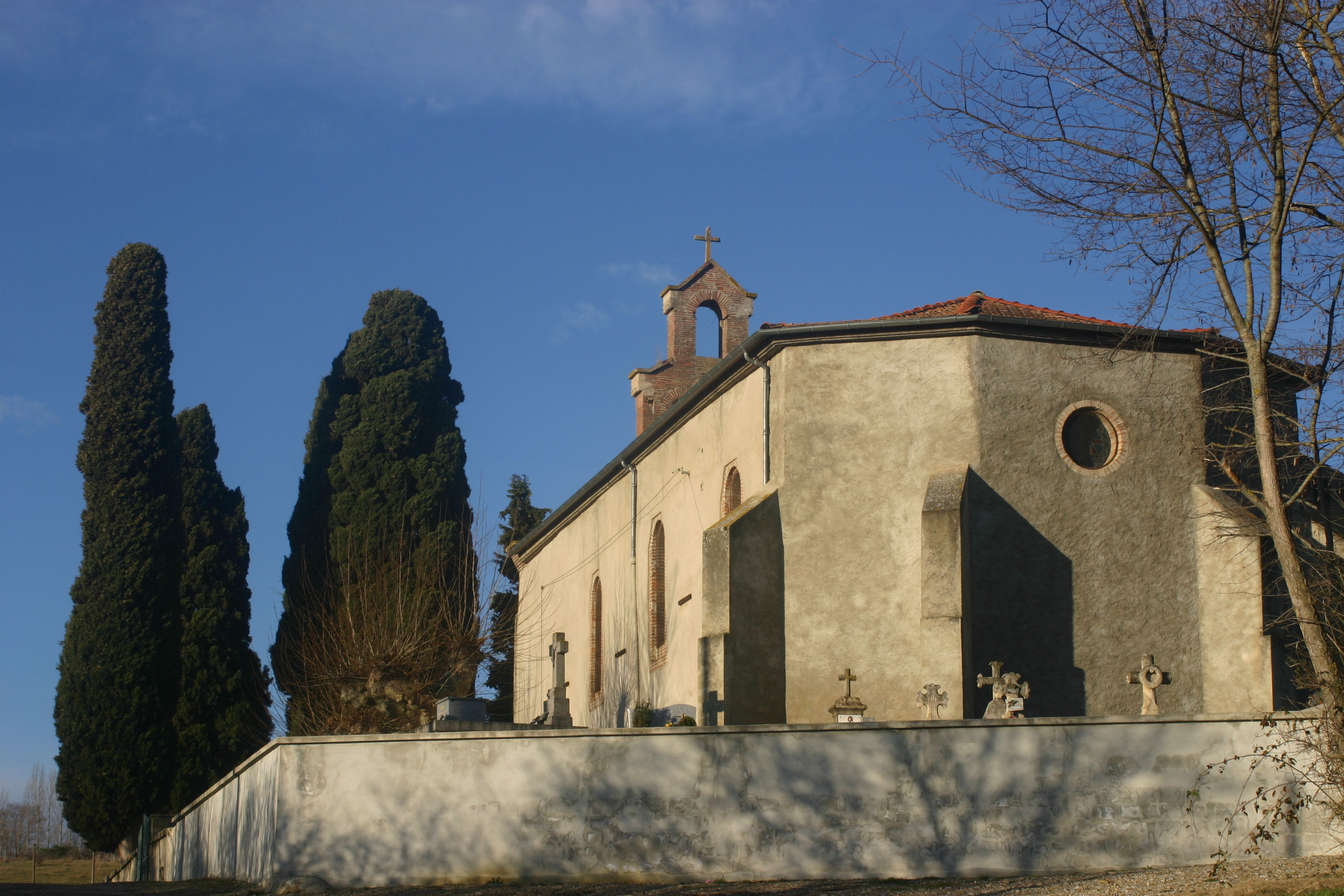 Chevet de l'église Saint-Vincent et Saint-Martial d'Arvigna (09).